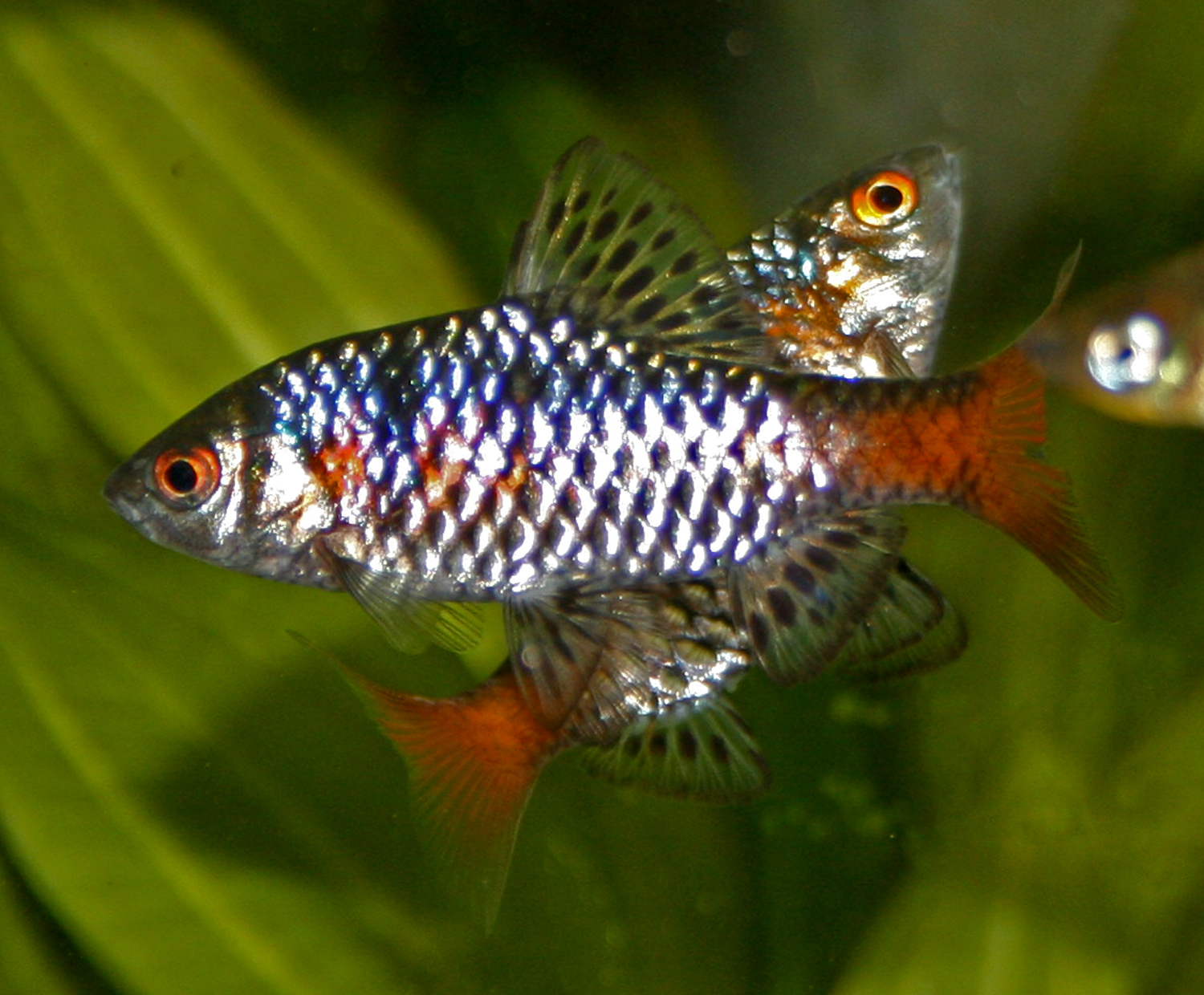 Puntius padamya (= "Puntius stoliczkanus var. Odessa")